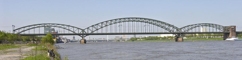 Köln-Poll, Südbrücke This is a photograph of an architectural monument.